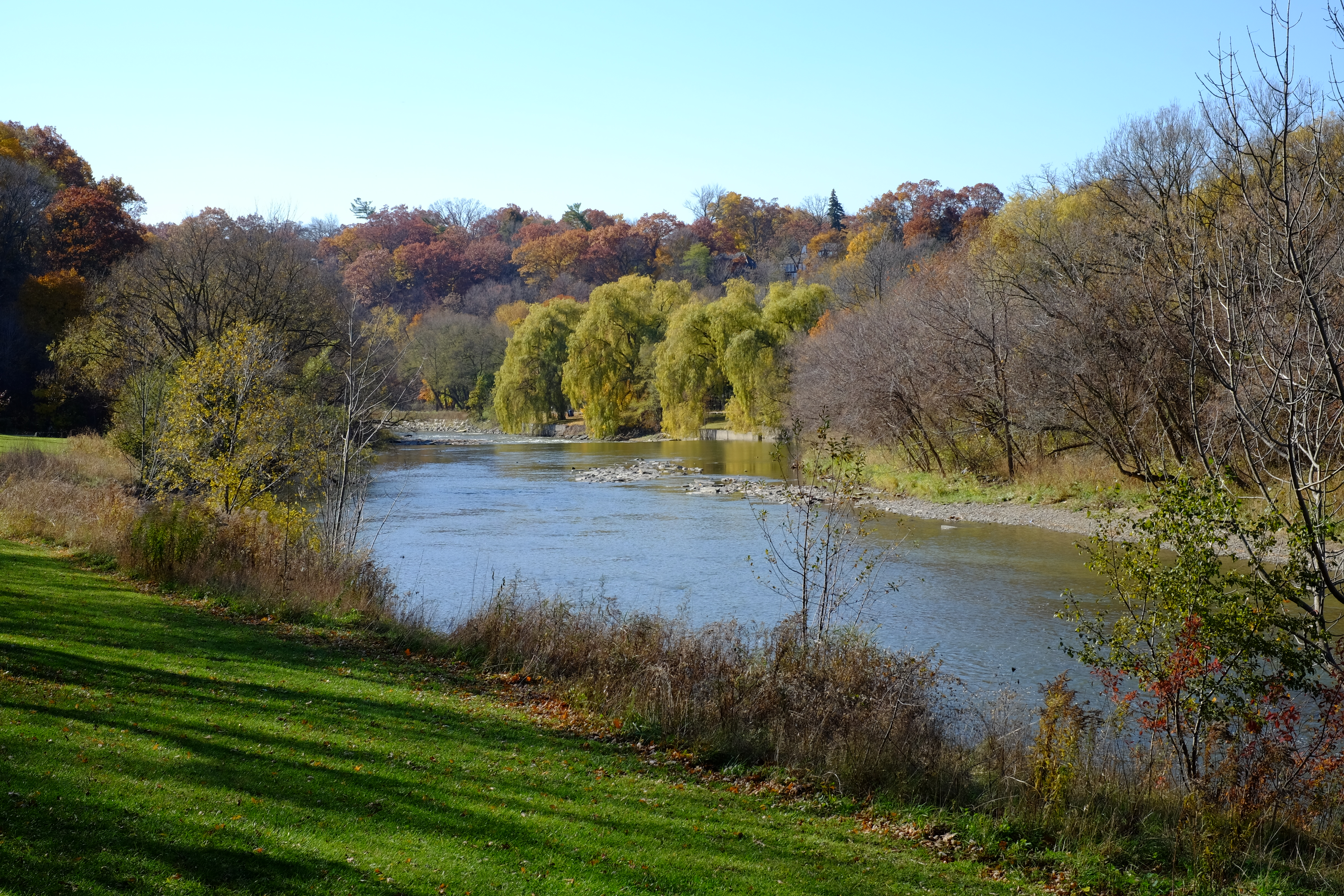 Magwood Park - November 3rd, 2015